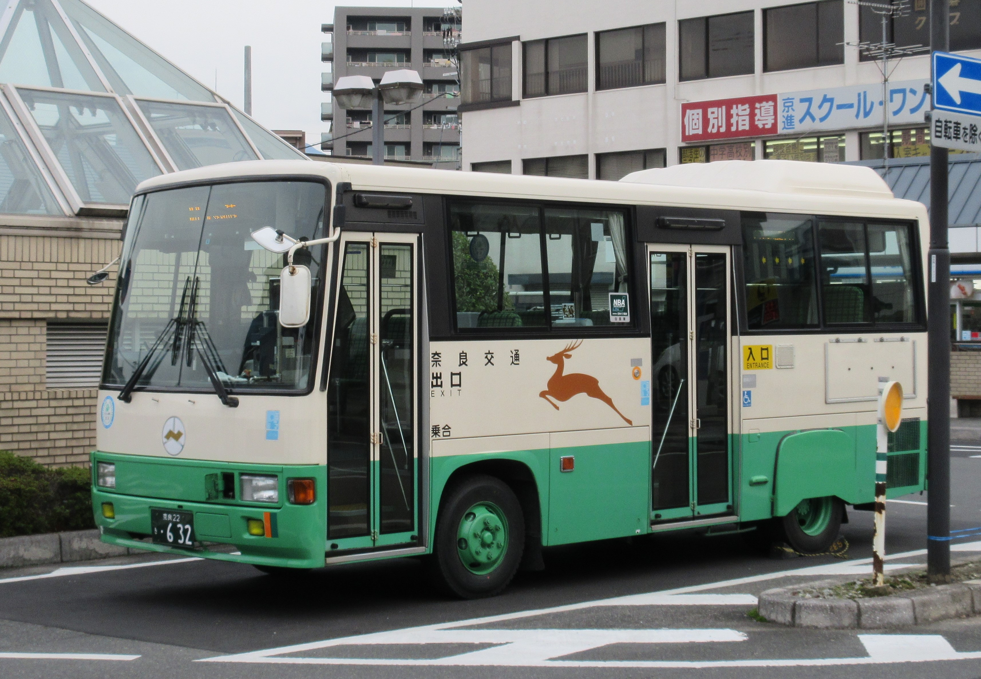 奈良交通632 (橿原神宮前駅にて)